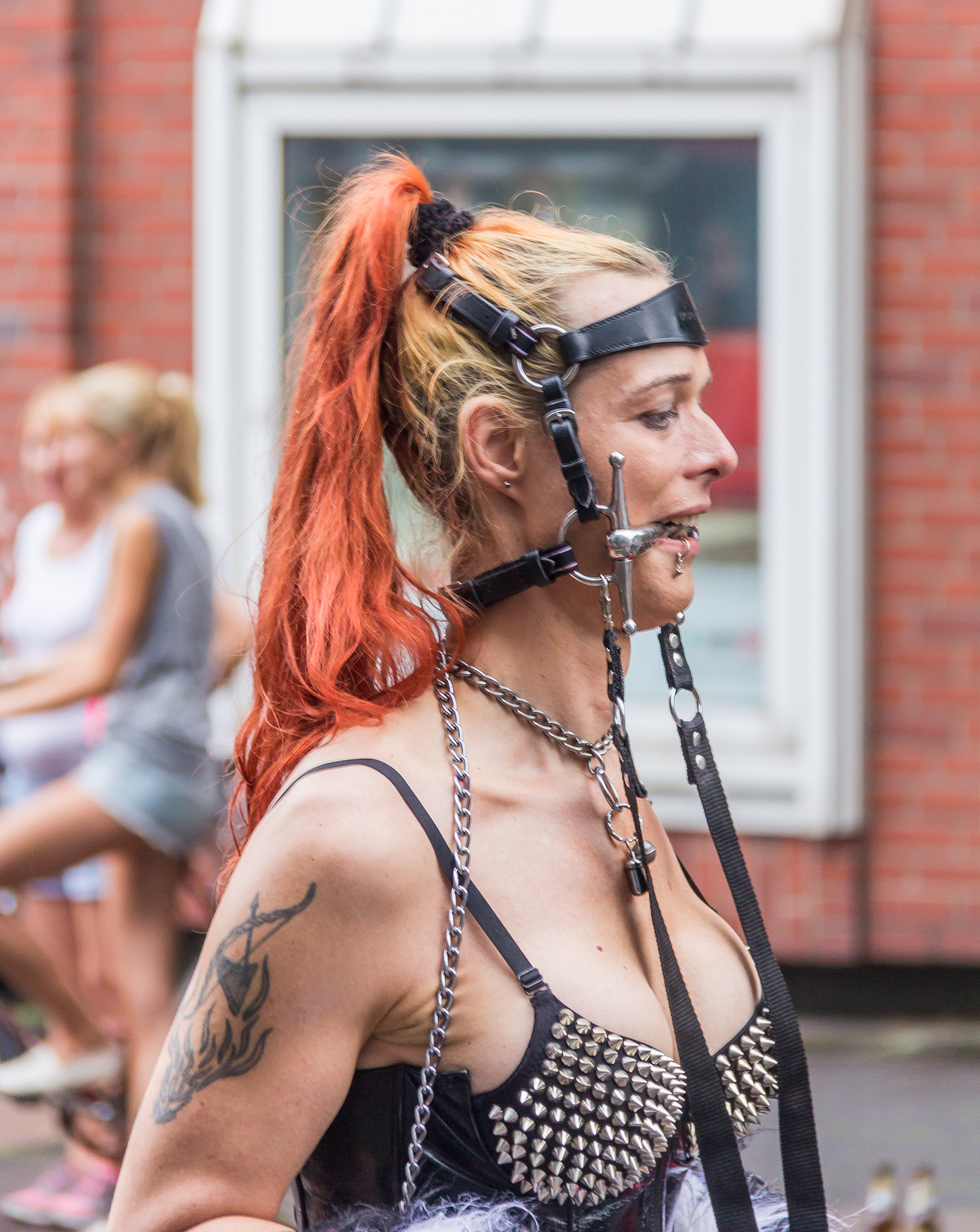 ColognePride 2014 - Straßenparade